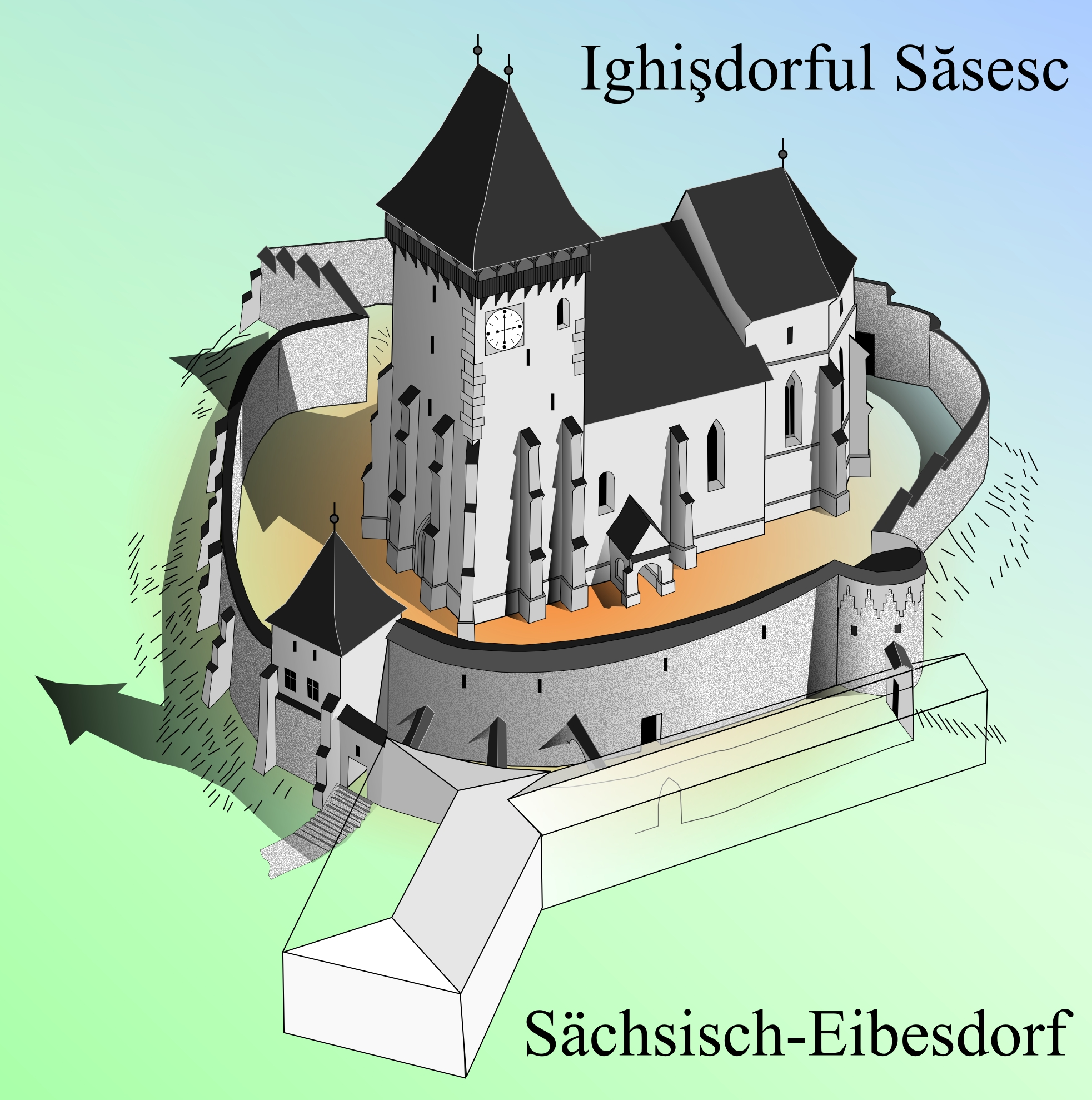 Biserica fortificata din Ighisu Nou.